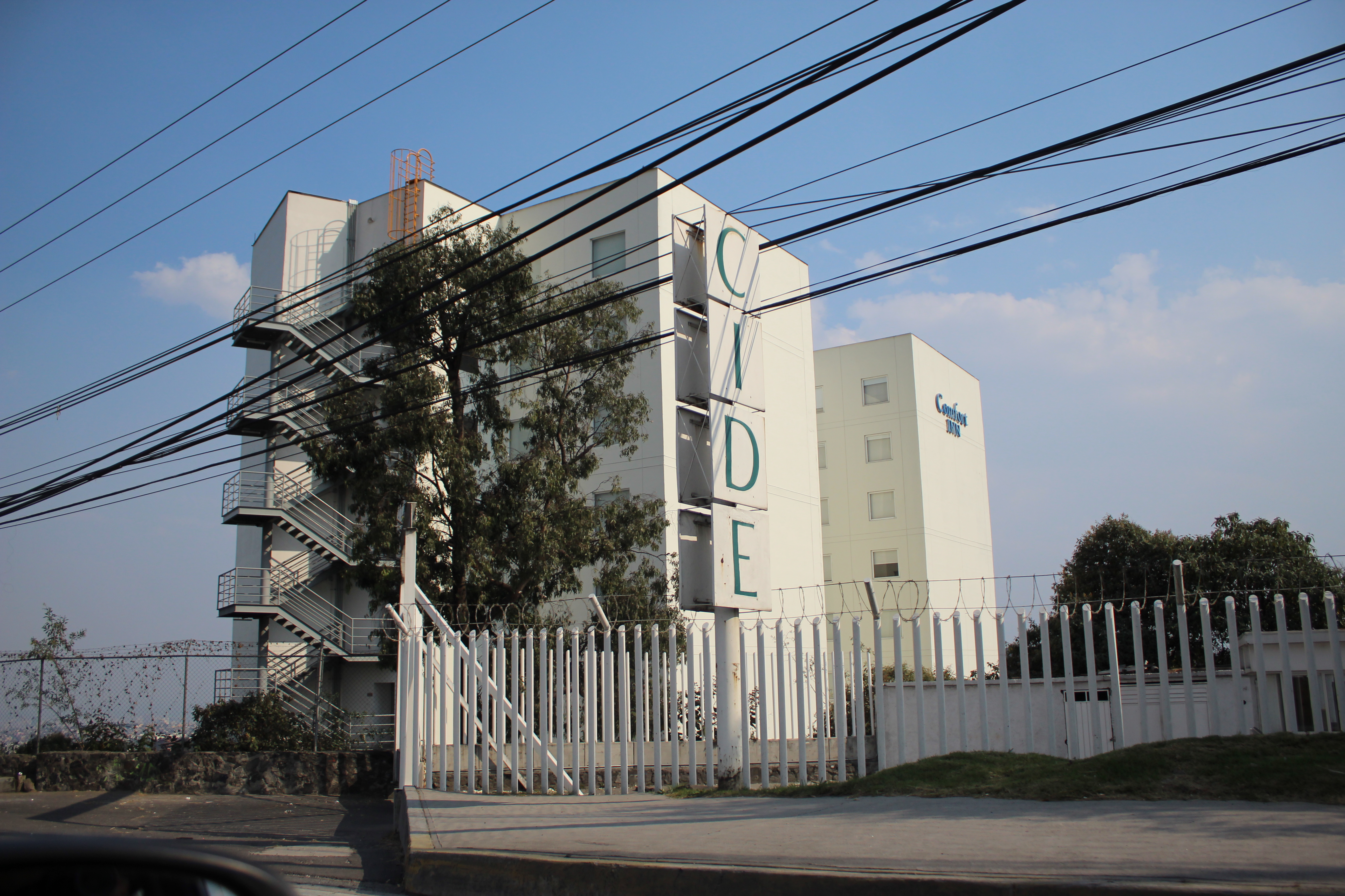 Edificio blanco y letrero del Centro de Investigación y Docencia Económicas, la entrada con rejas blancas, desde la carretera